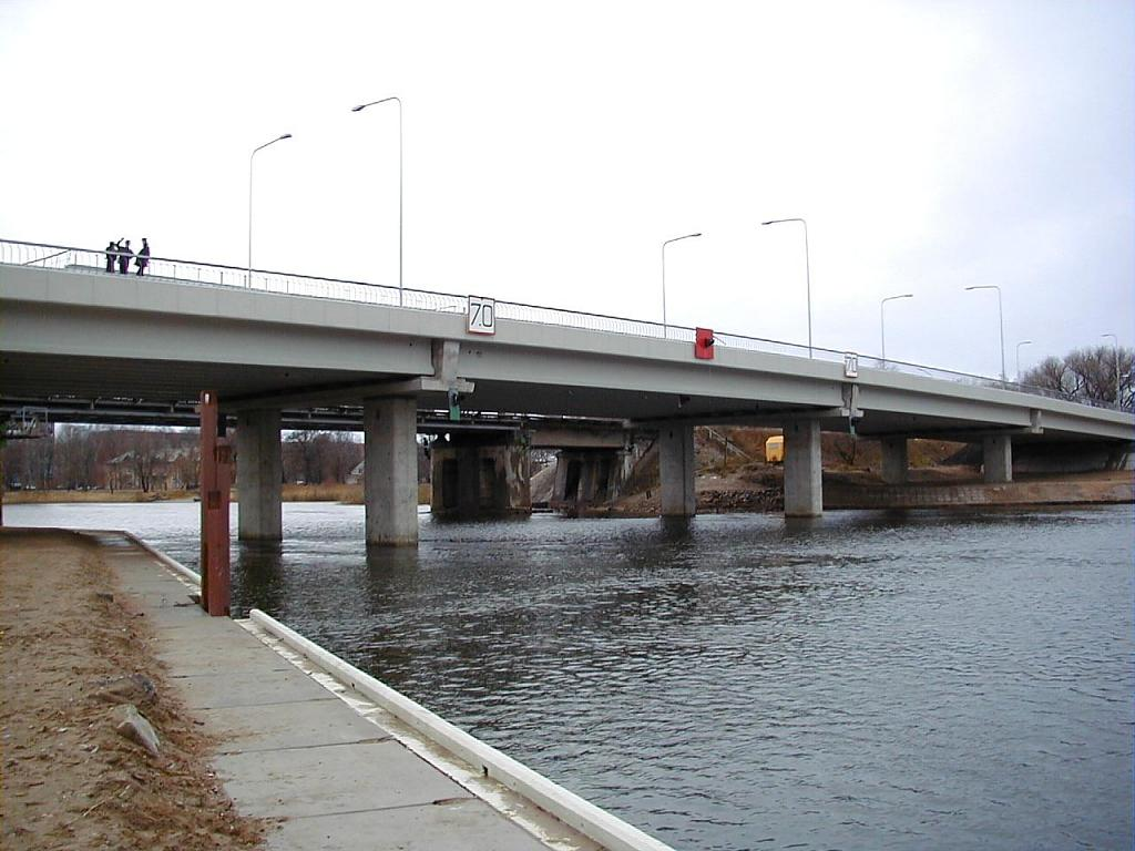 Bolderājas jaunais tilts